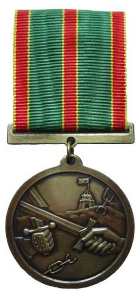 Lietuvos kariuomenės kūrėjų savanorių medalis